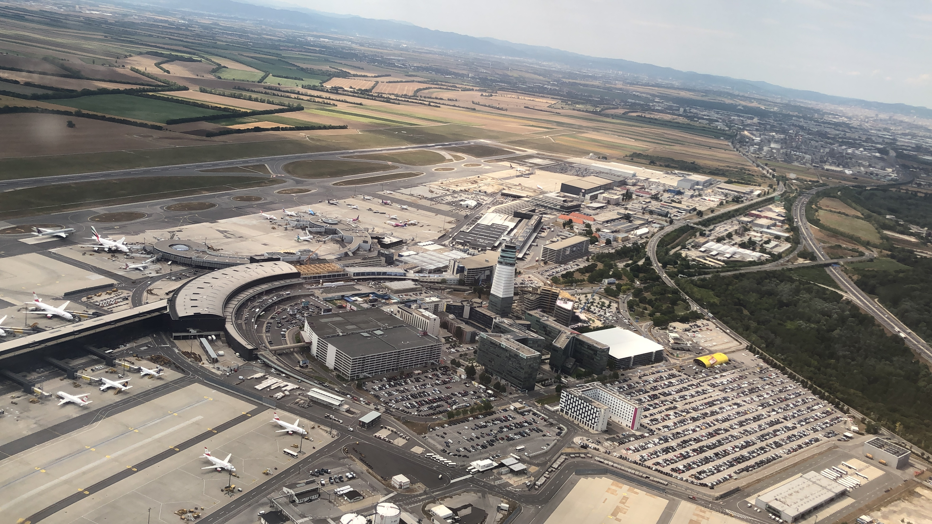 Luchthaven Wenen, Schwechat, Oostenrijk, August 2019